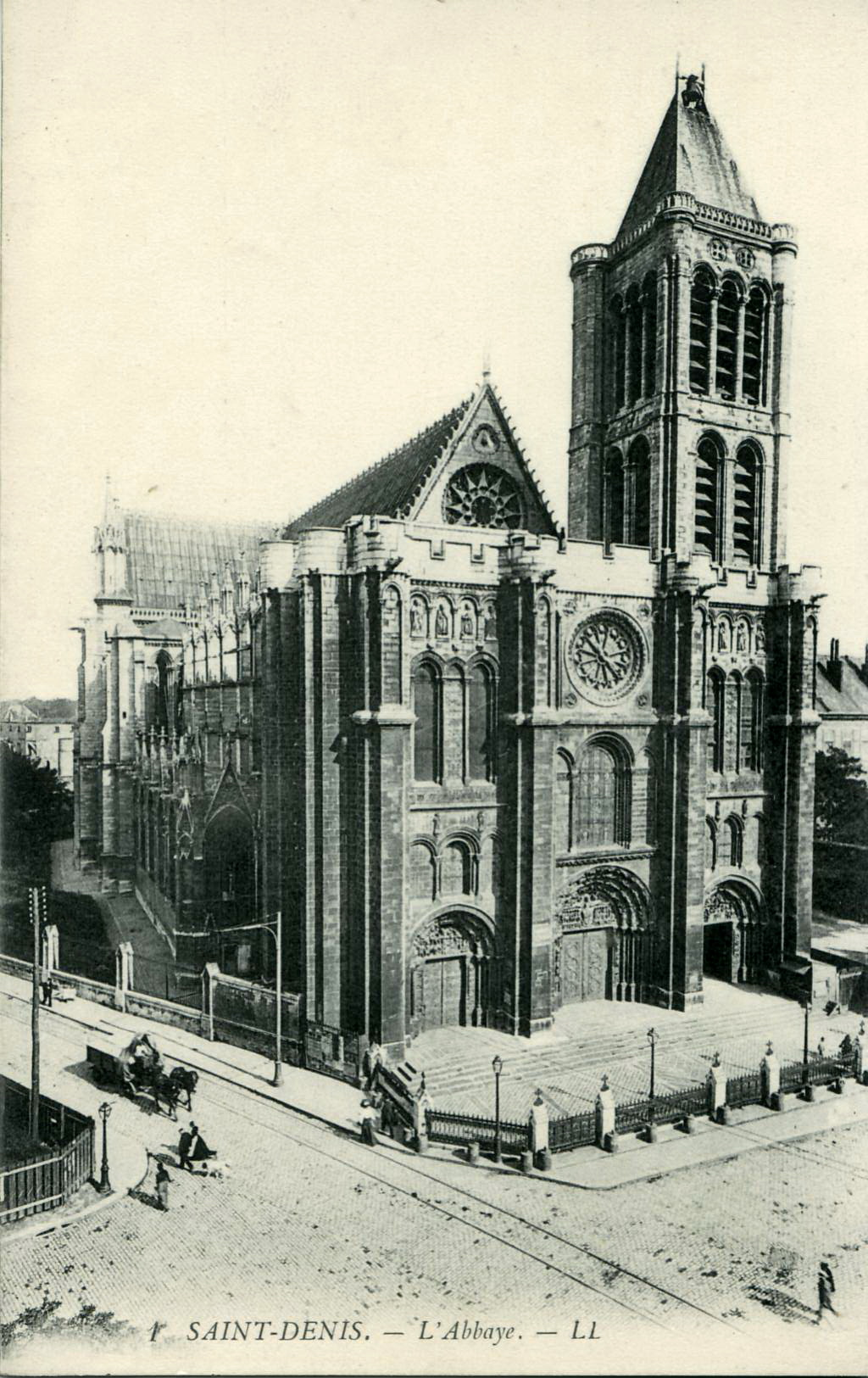 Carte postale ancienne éditée par LL, n°1 :SAINT-DENIS - L'Abbaye